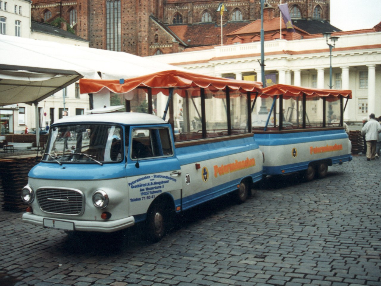 „Petermännchen“ – Bus mit Anhänger Stadtrundfahrten auf Barkas-Basis Quelle: Harald H. Linz Fotograf: Harald H. Linz Mit Genehmigung von Harald. H. Linz für Wiki eingestellt.